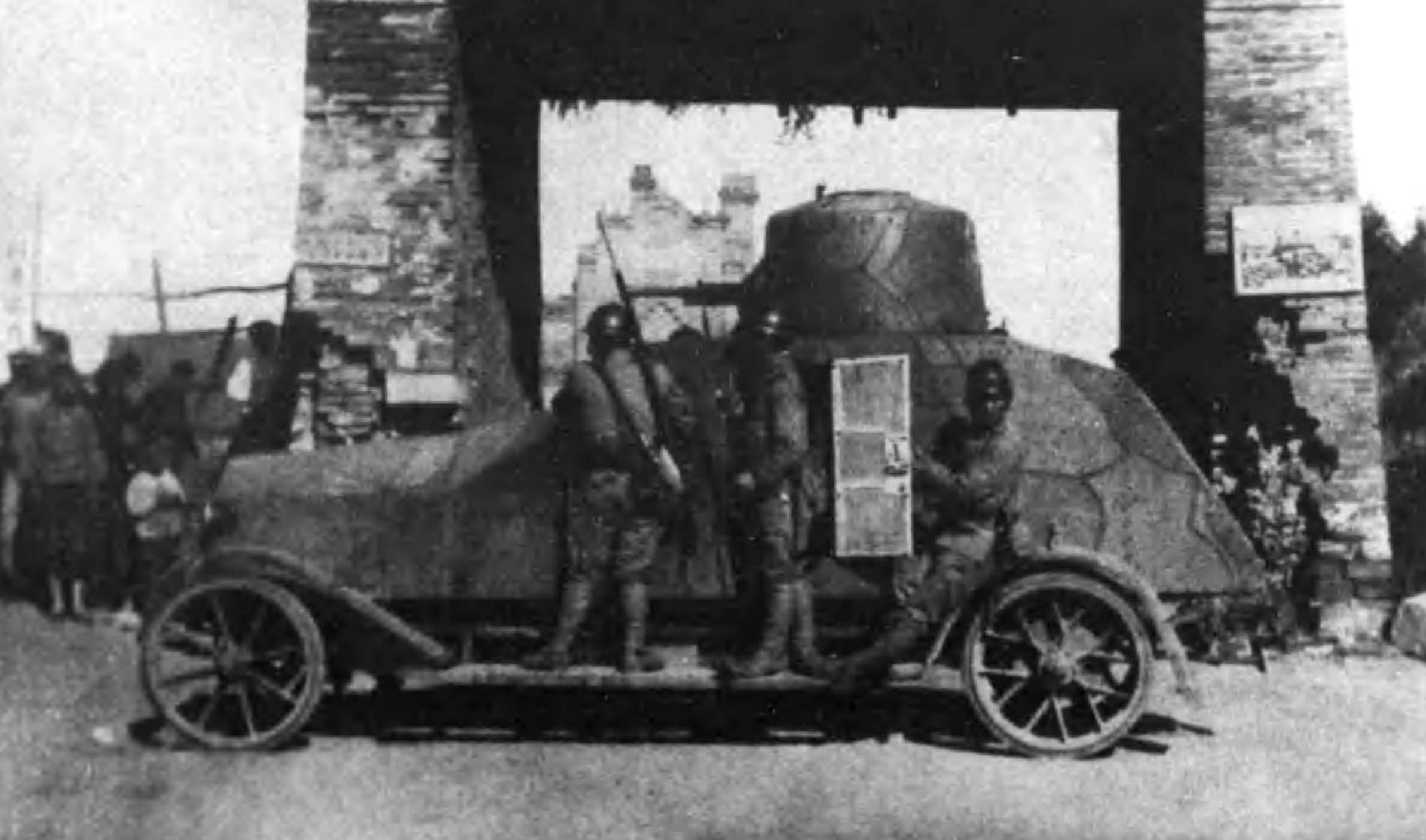 奉天にて撮影されたウーズレー装甲自動車